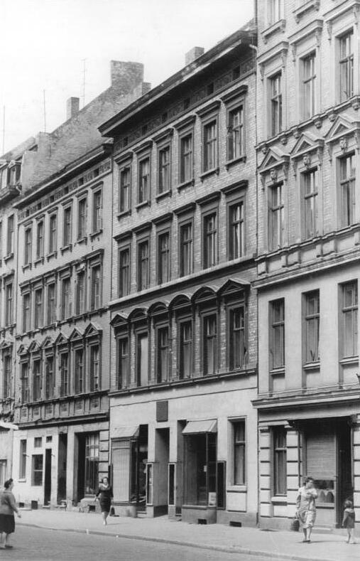 Magdeburg, Erich-Weinert-Gedenkstätte Zentralbild Biscan 26.6.1962 Die Erich-Weinert-Gedenkstätte in Magdeburg In Magdeburg wurde 1961 im Geburtshaus des Arbeiterdichters Erich Weiner eine Erich-Weinert-Gedenkstätte eingerichtet, in der viele Dokumente, Fotos, Zeitungsausschnitte, Plakate und Tonbilder einen Überblick über das politische und literarische Schaffen des großen Sohnes der Arbeiterklasse geben. UBz: Der Eingang in das Geburtshaus Erich Weiners. Darüber eine Gedenktafel.